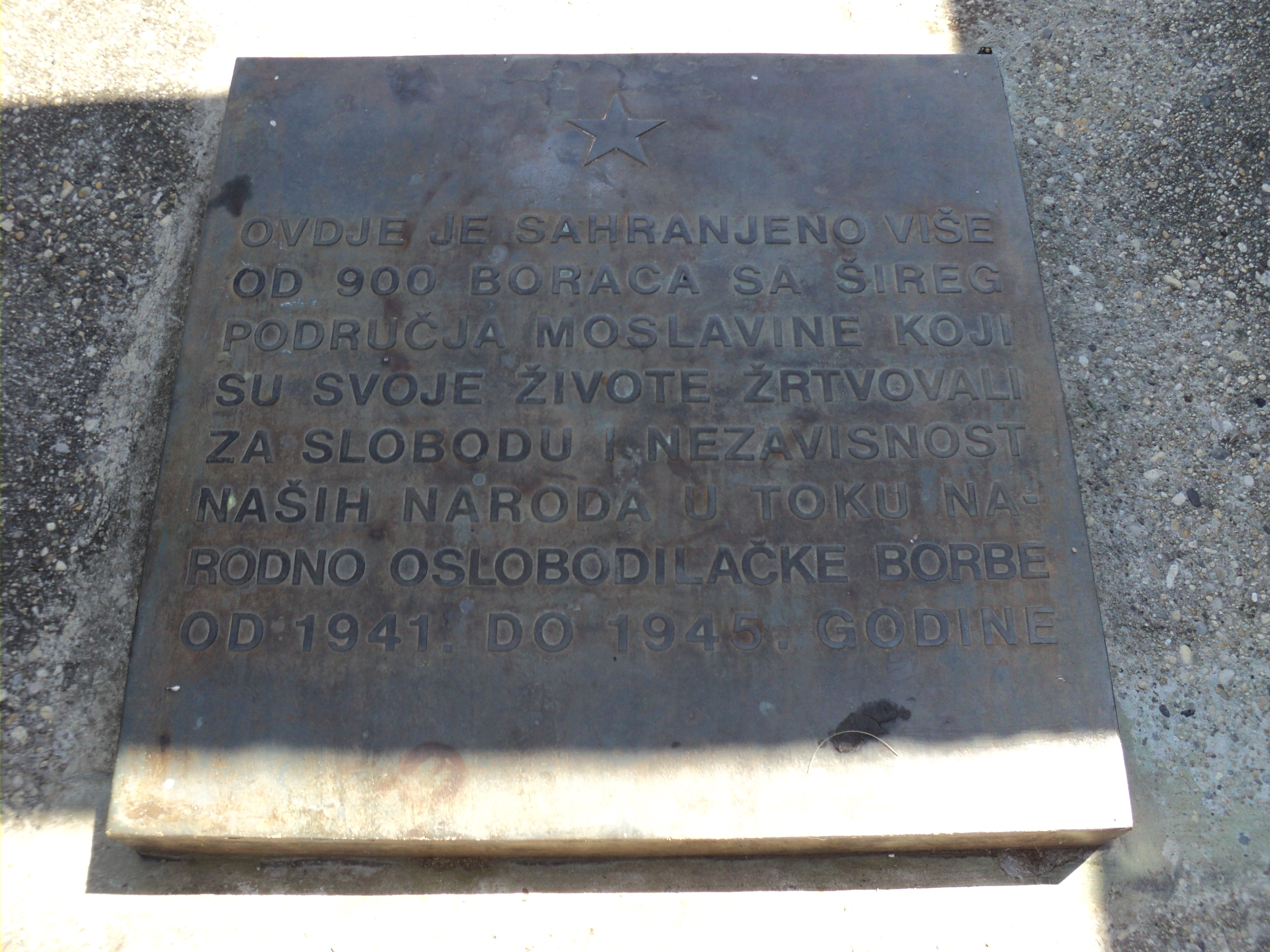 Spomen-ploča na grobnici pred spomenikom revolucije u Podgariću. Self-made. Jun 2011.